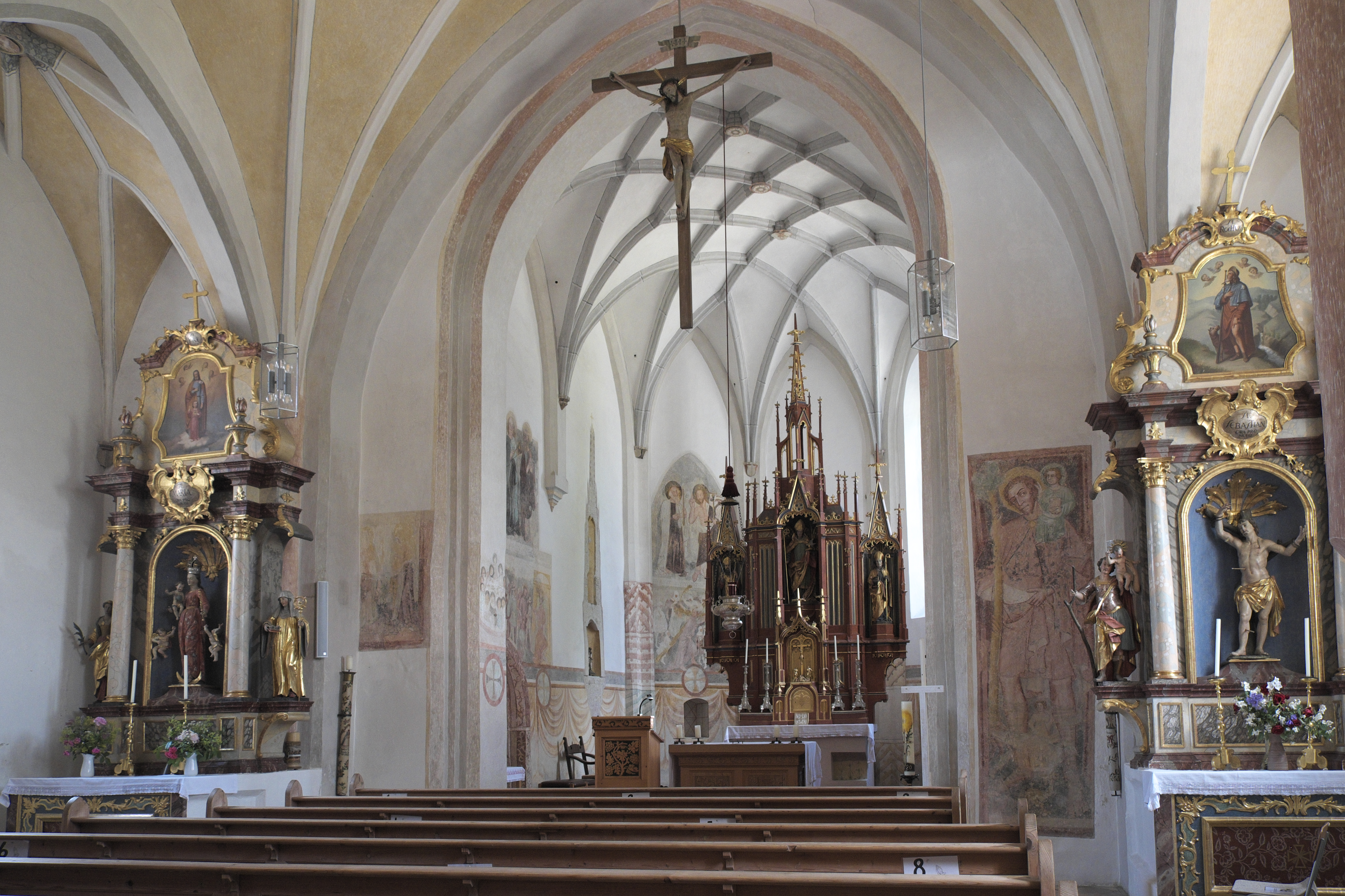 Katholische Filialkirche St. Remigius in Lappach (Sankt Wolfgang) im oberbayerischen Landkreis Erding (Bayern/Deutschland), Innenraum